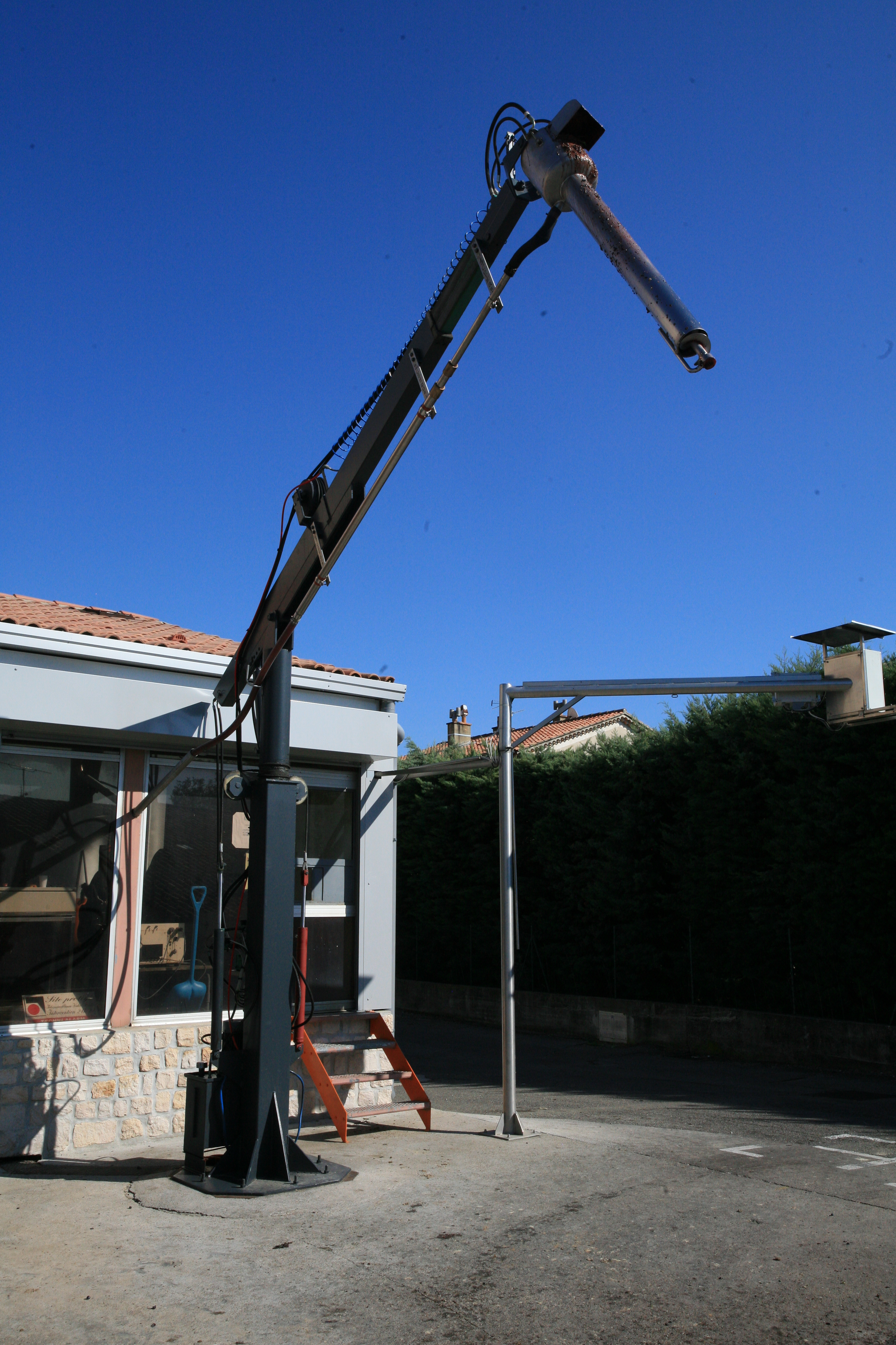 sonde devant cave de Vacqueyras,France